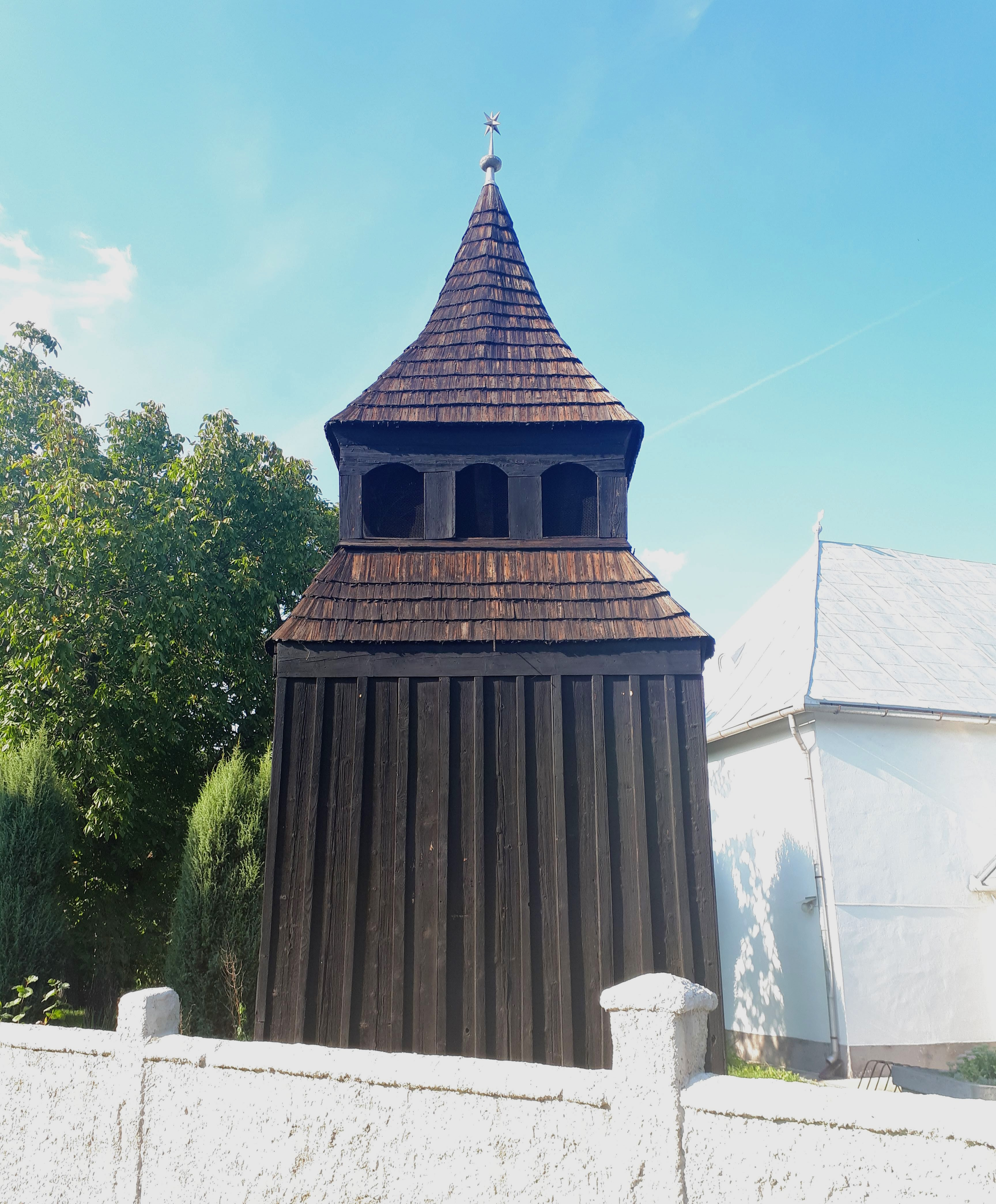 A berzéki református templom mellett álló 18. századi fa harangláb This is a photo of a monument in Hungary. Identifier: 2668